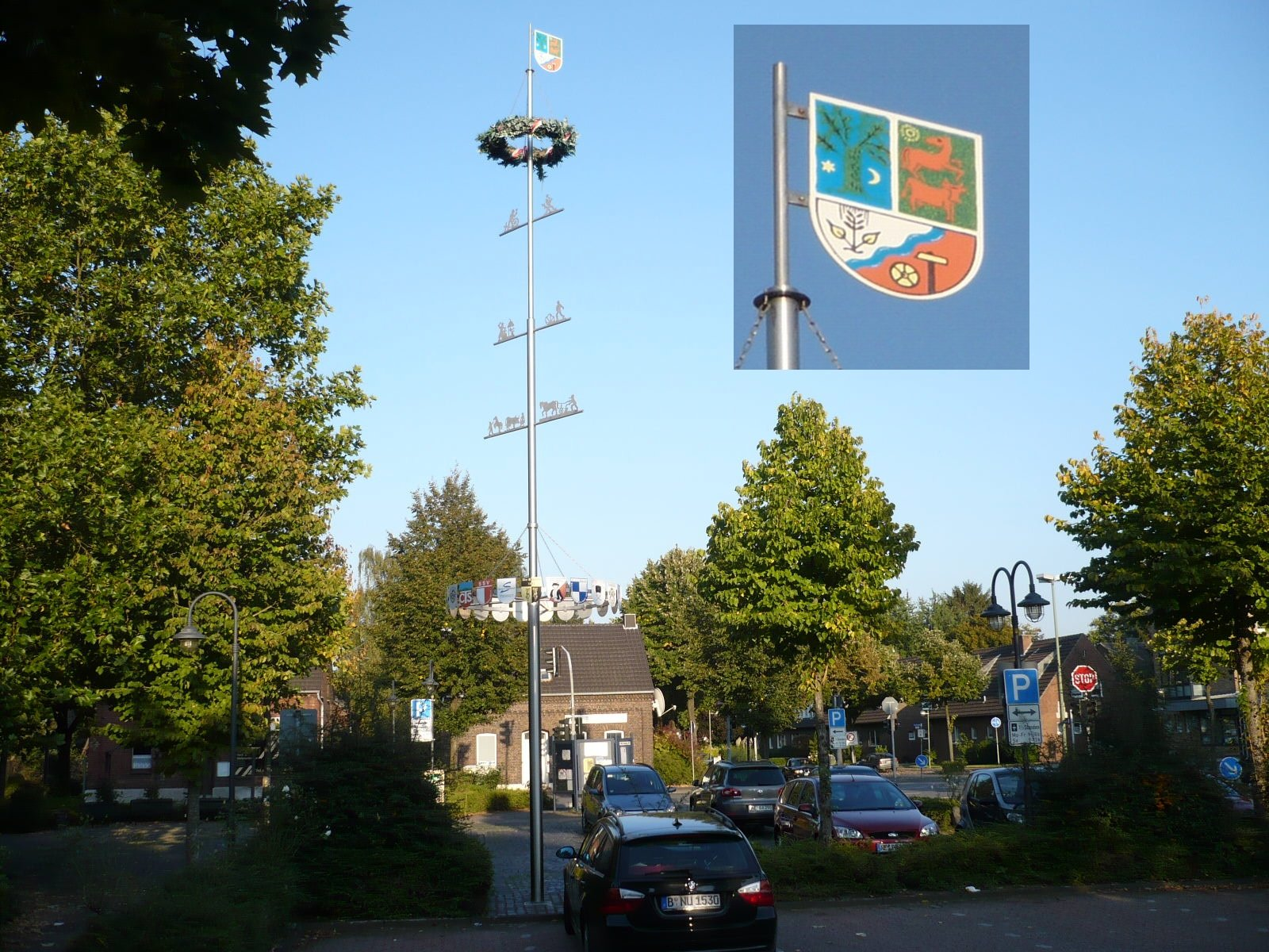 Schützen-Maibaum auf dem Marktplatz von Meerbusch-Strümp, mit inoffiziellem Wappen